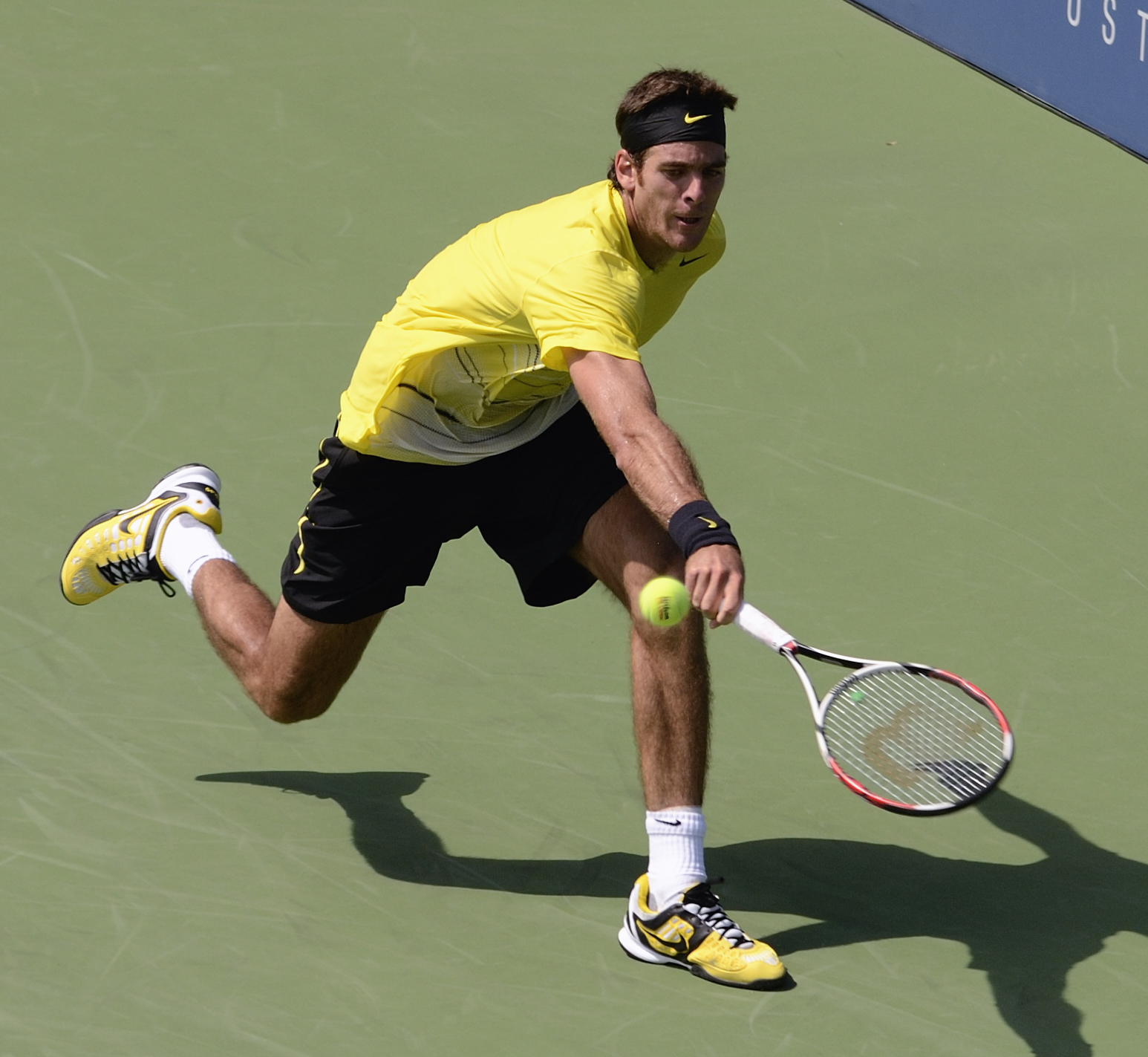 defensive lob